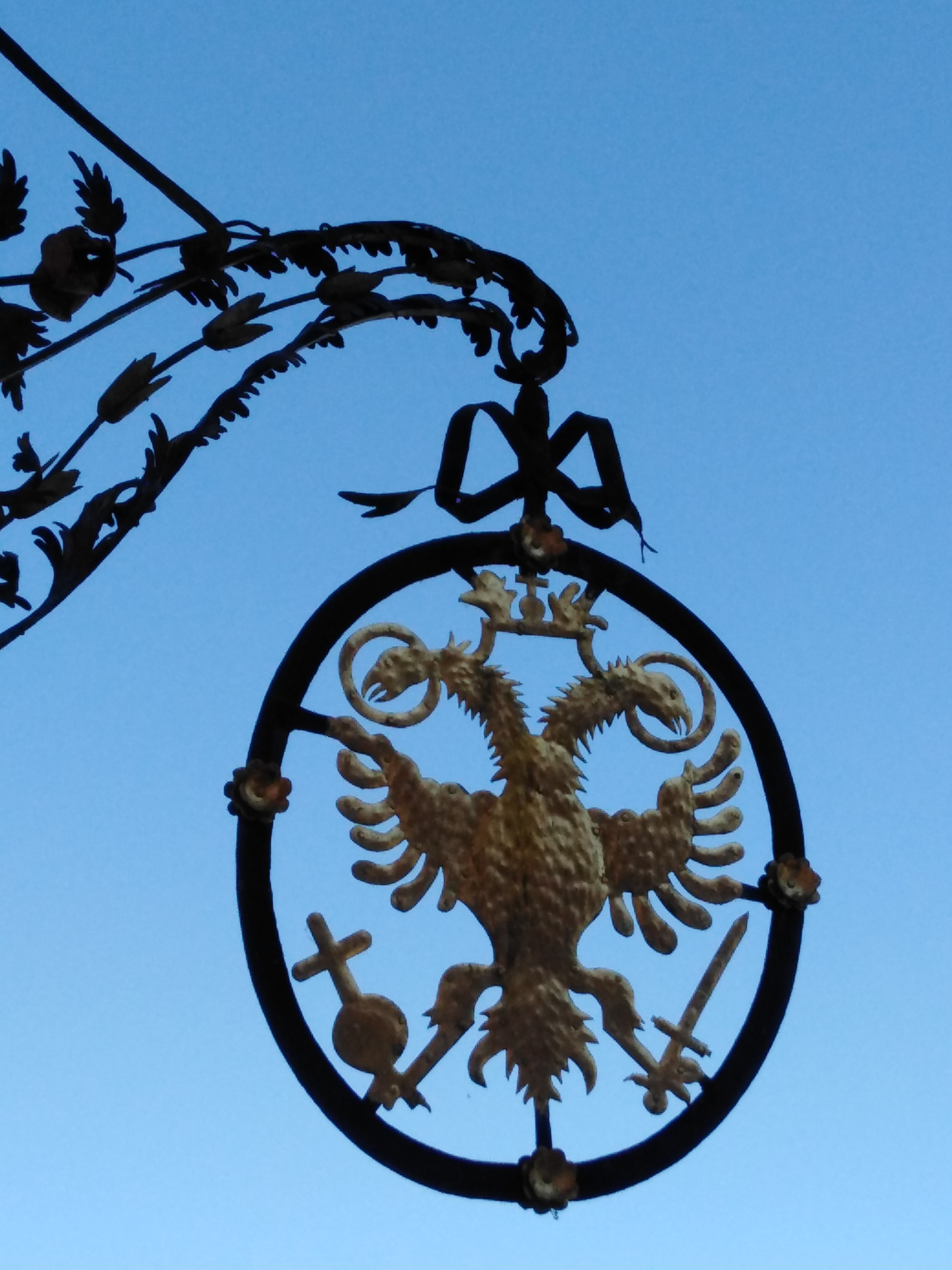 Gasthaus Adler in Lauchringen im Landkreis Waldshut in Baden-Württemberg. Ersterwähnung im Habsburger Urbar 1308. Der Doppeladler im Gasthausschild als Symbol des Kaiserreiches Österreich und der Kaiserlichen Reichspost.